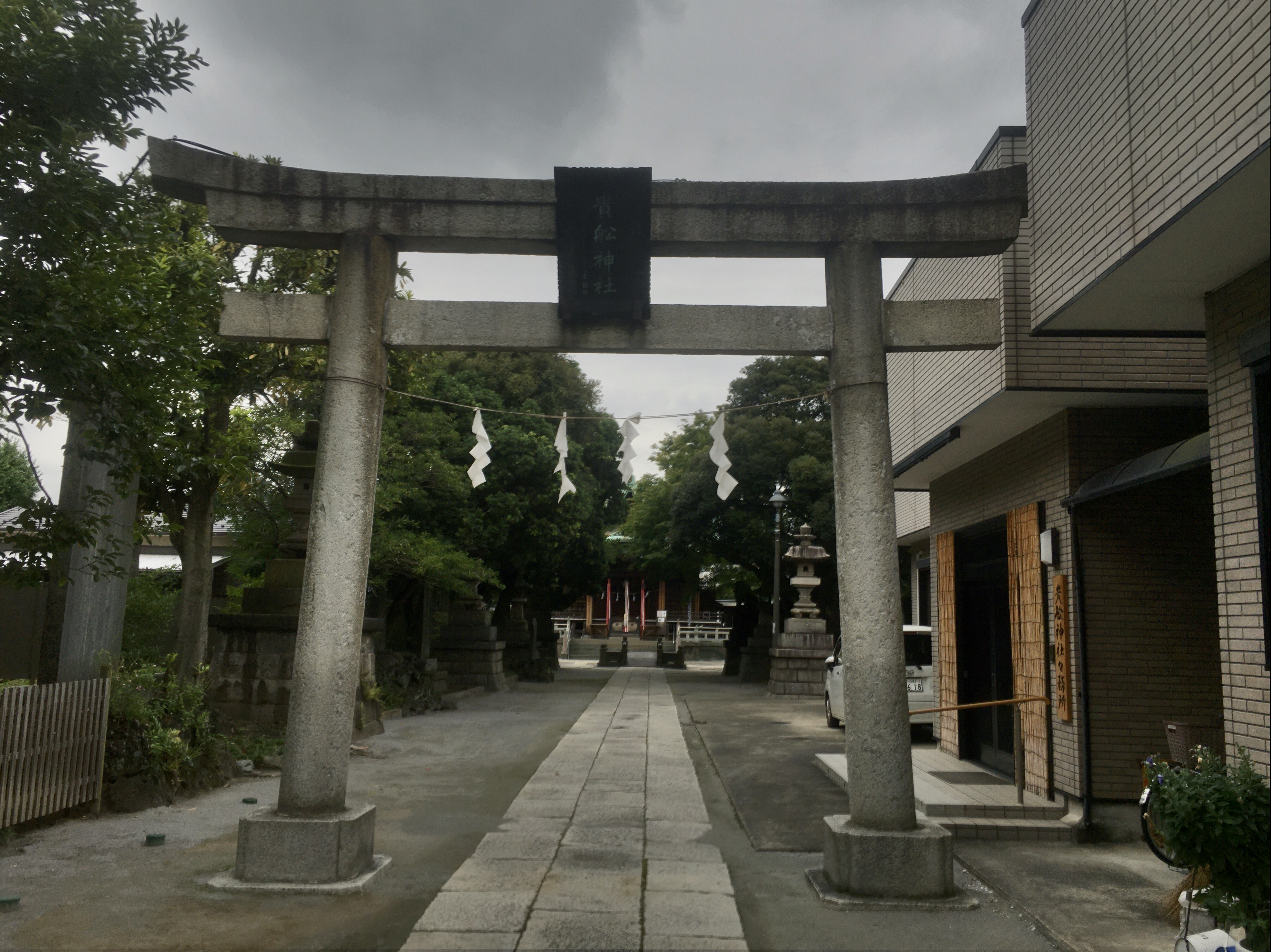 貴舩神社（きふねじんじゃ, Kifune Shrine）